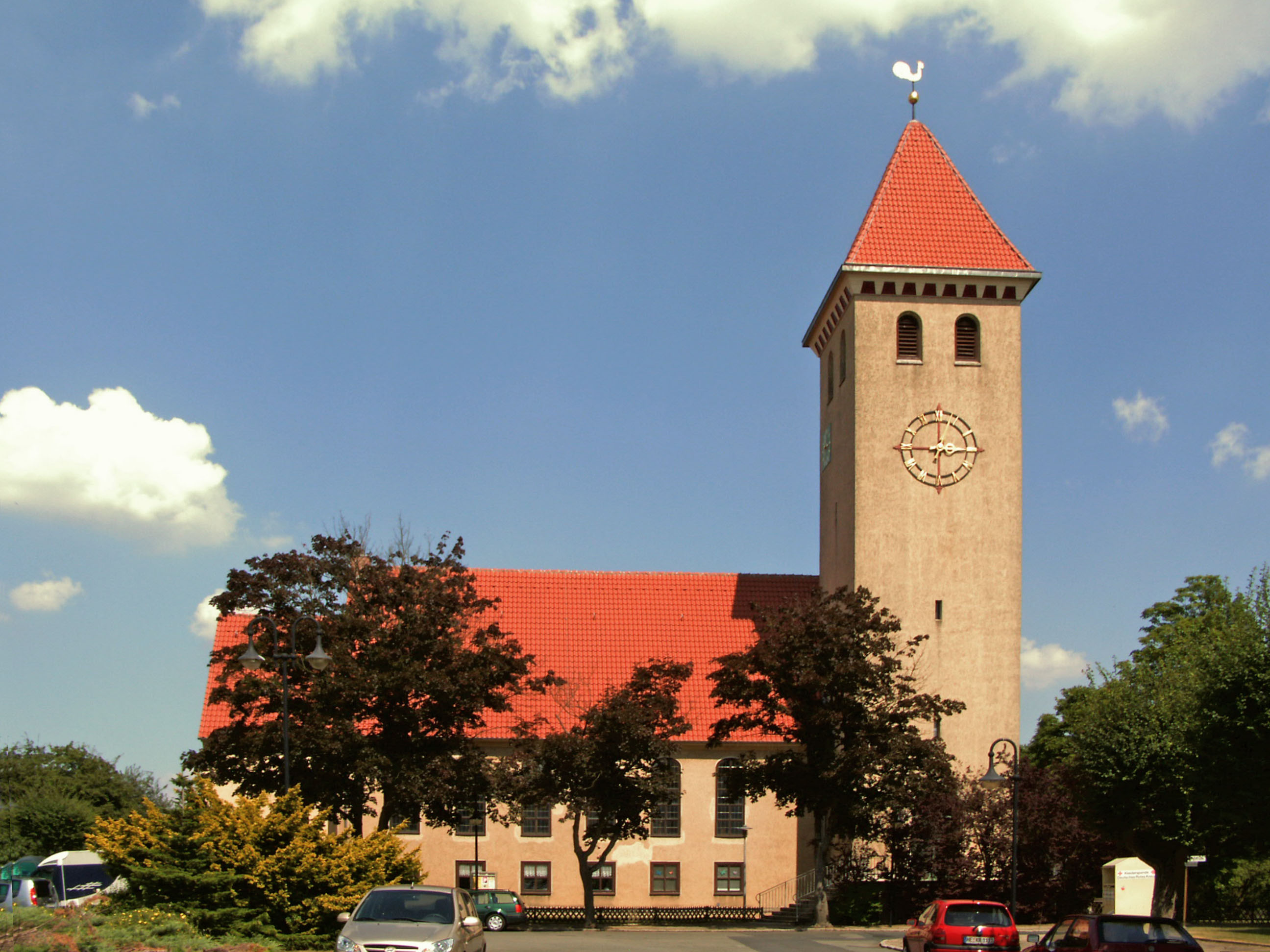 Ev. Martin-Luther-Kirche in Neu Büddenstedt, Landkreis Helmstedt